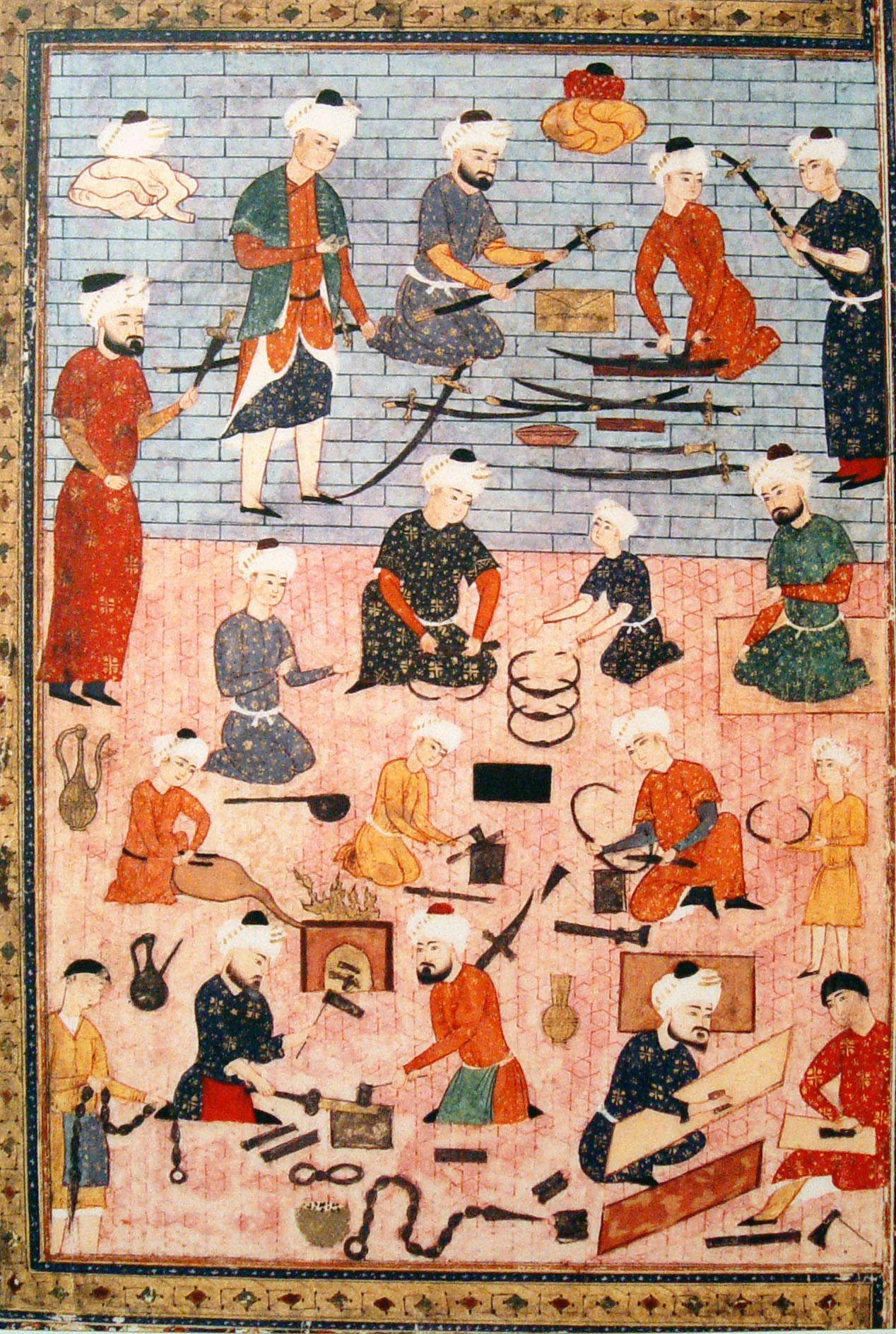 Kamera: Sony DSC-F717 Waffenwerkstatt mit Verkaufsraum Die Miniatur zeigt im unteren Bereich iranische Handwerker bei der Herstellung von Säbeln, Ketten, Leder und Bögen. Ein Schmied facht das Feuer mit einem Blasebalg an. Oben ist der Verkaufsraum, in dem die Kunden die dargebotenen Waren begutachten. Iranische Miniaturmalerei, Tinte, Farben, Gold und Silber auf Papier, Mitte 16. Jh. Metropolitan Museum of Art, New York (Inv. Nr. 1981.473) Period: Safavid Museum: Metropolitan Museum of Art, New York, NY, United States Inventory #:1981.473 Material: Ink, colors and gold on paper Date: Mid-16th century Inscription: Definition: Arabic Location: Verso, in oval medallion Style: nasta'liq Transliteration: al- izz li-dhalika (probably dhatika)#CR#wa'l-jalal likibriya'ika#CR#wa'l-'azmat lishanika#CR#wa'd-dawam libaqa'ika#CR#ya qa'im adh-dhat#CR#wa mufid al-khairat Translation: Invocation of God#CR#Glory belong to Thy "essence" (not as in the text, "to that one")#CR#and majesty to Thy grandeur and greatness to Thy affair and continuity to Thy eternal life O Thou who exists through Himself